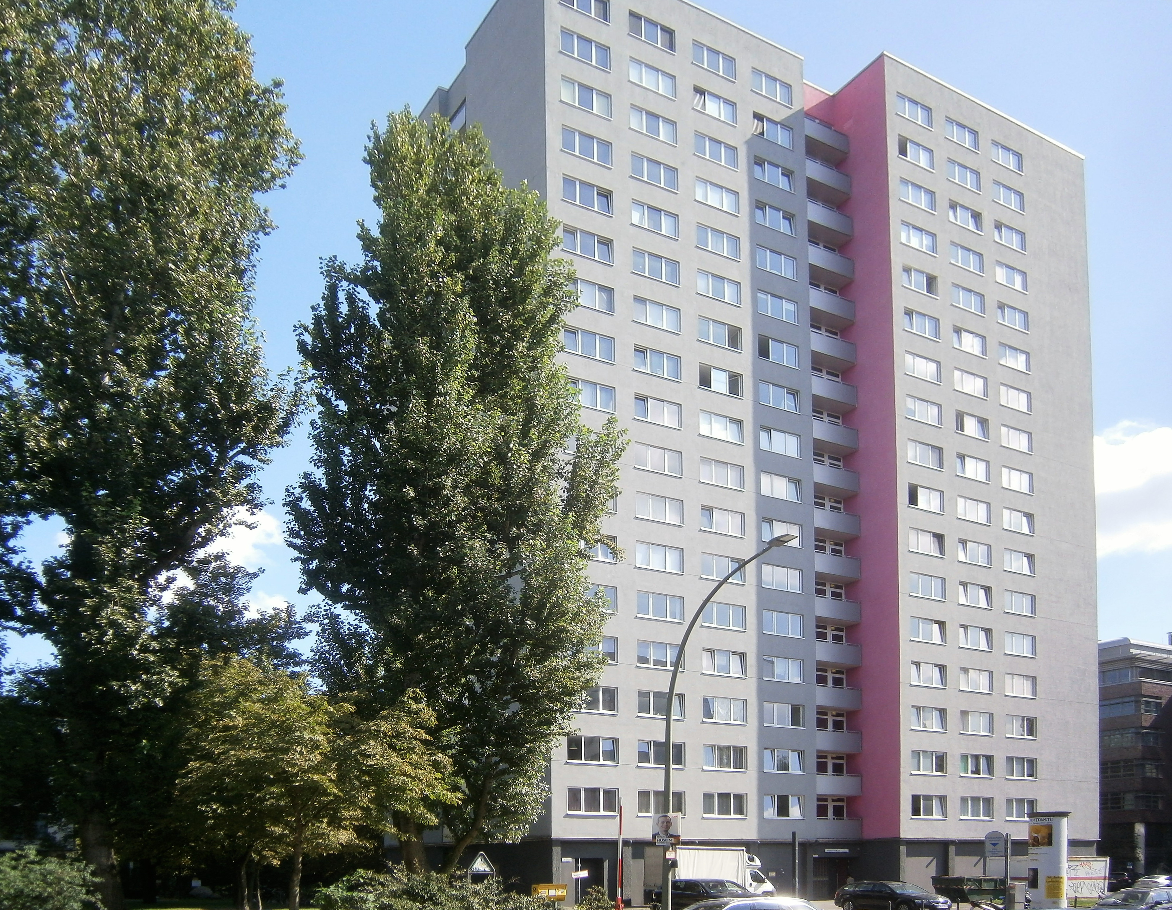 Die Andreasstraße ist ein Straße im Berliner Bezirk Friedrichshain-Kreuzberg, Ortsteil Friedrichshain zwischen Holzmarkstraße/ Stralauer Platz (nahe Ostbahnhof) und der Karl-Marx-Allee. Das Wohnhochhaus Andreasstraße 22.